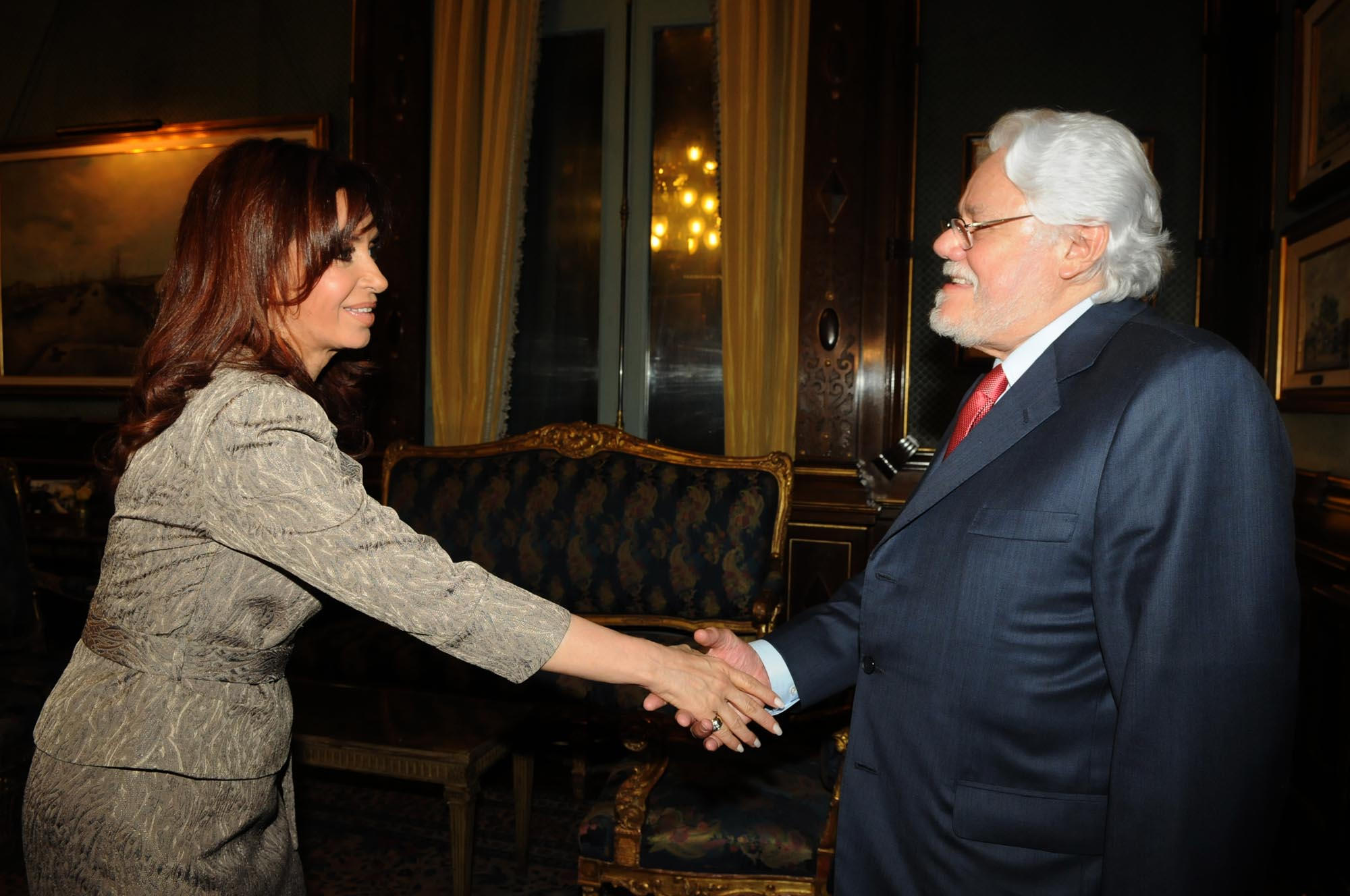 Cristina Fernandez presidenta de Argentina y Carlos Gaviria lider de la oposición en Colombia.